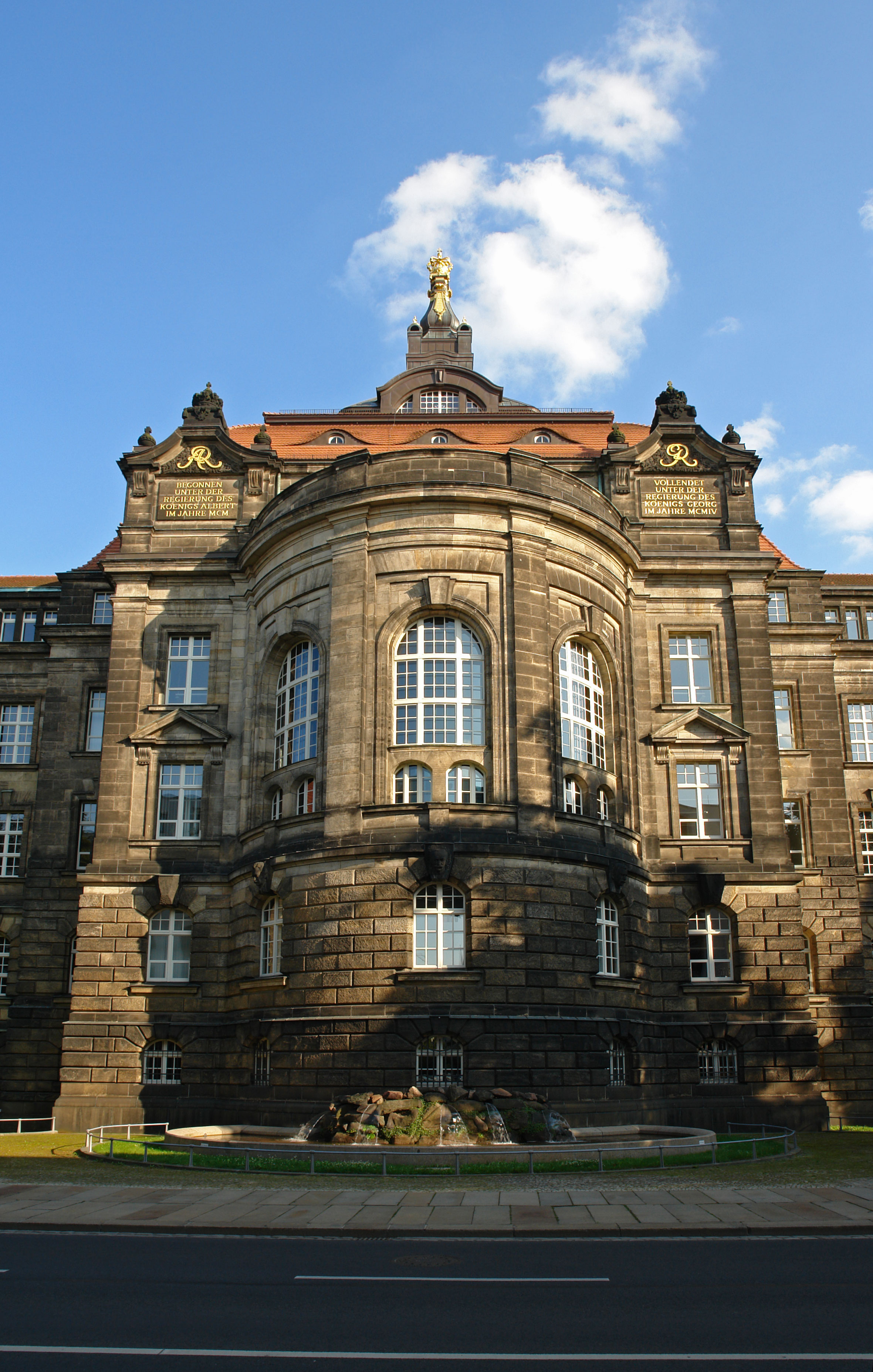 Rückseite der Sächsische_Staatskanzlei